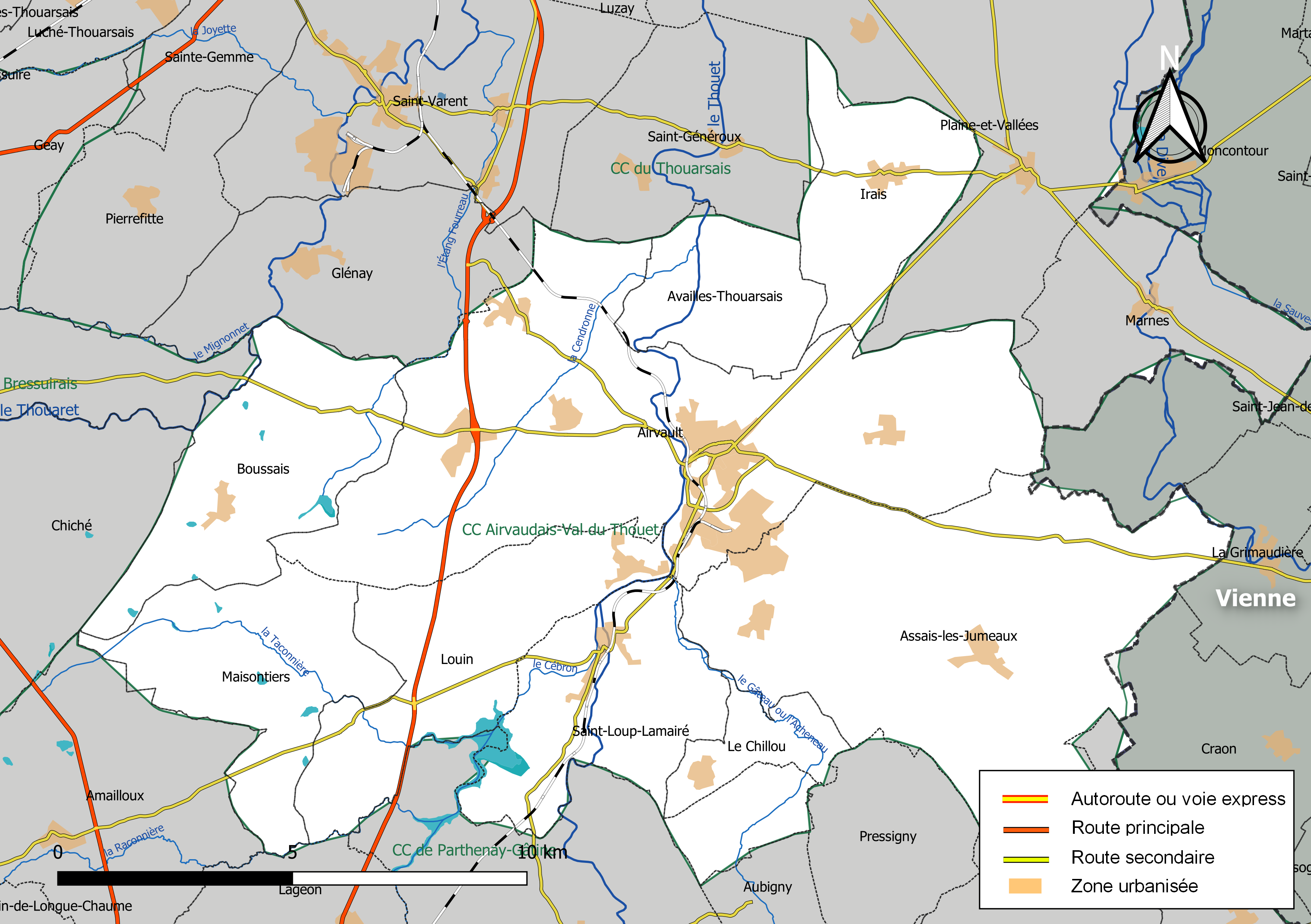 Carte géographique de la Communauté de communes Airvaudais-Val du Thouet, département des Deux-Sèvres, France. Composition au 1er janvier 2019.